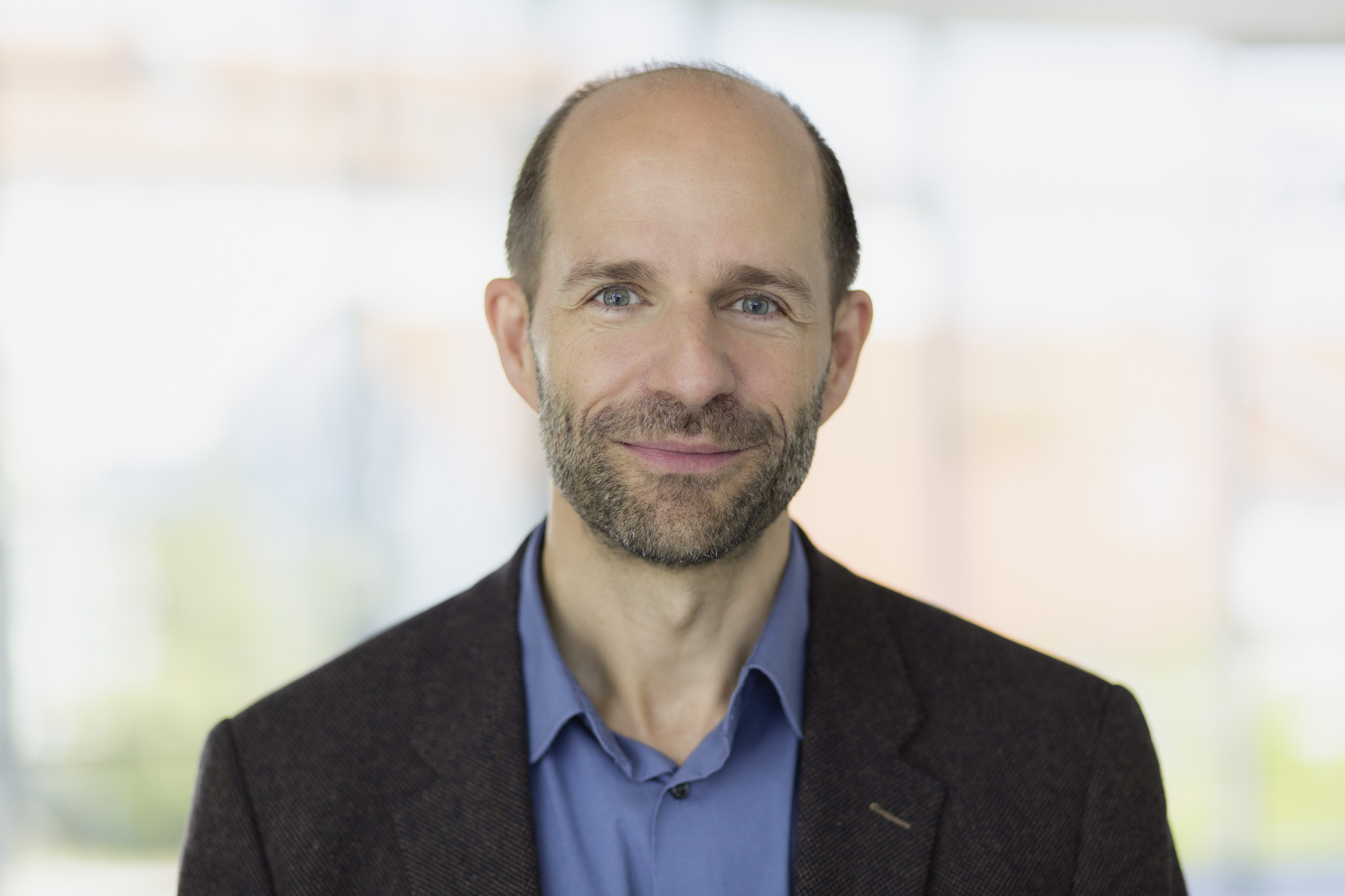 Prof. Dr. Christian Hertweck